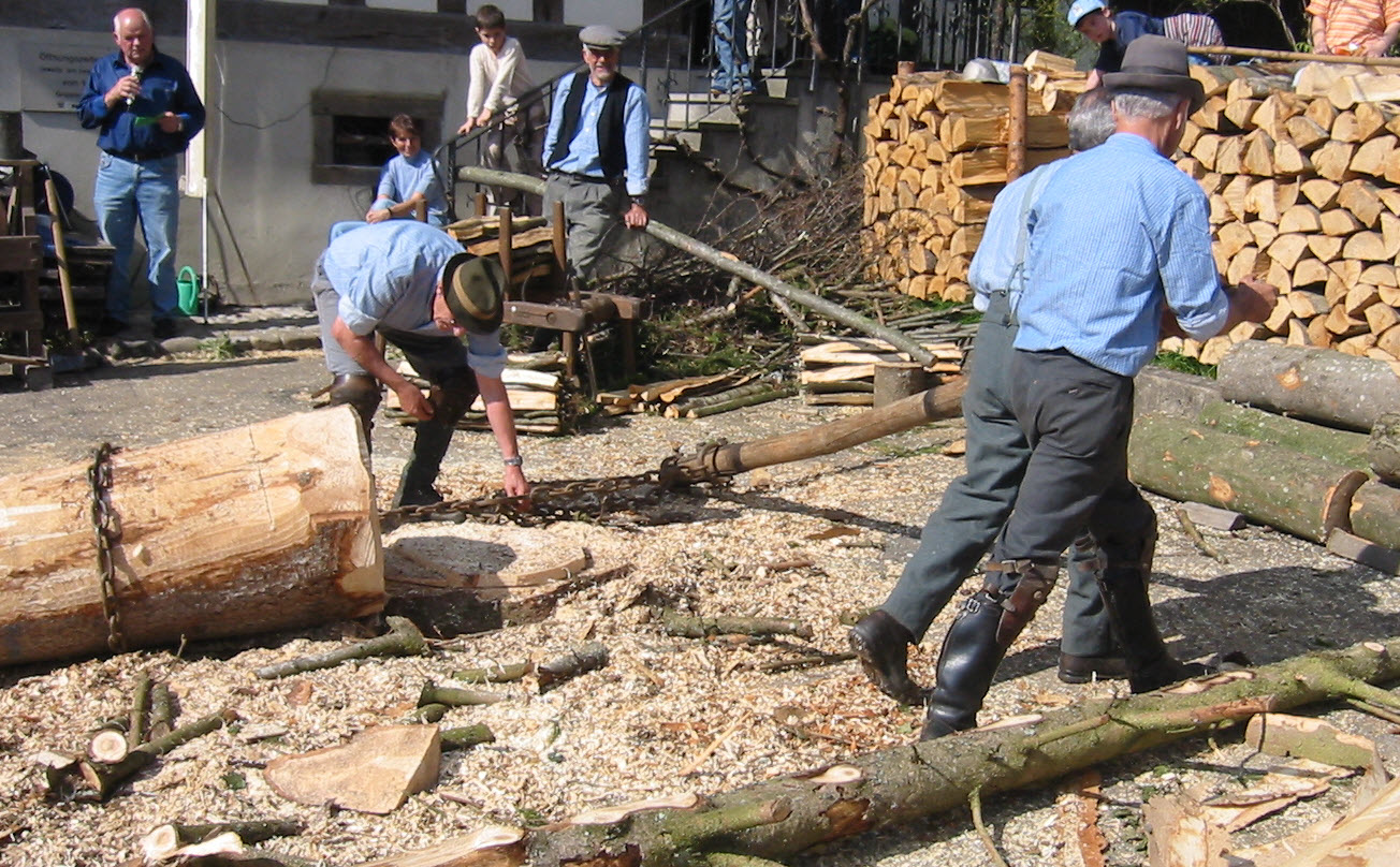 Einsatz eines Waldteufels in Rafz (Kanton Zürich), 2004